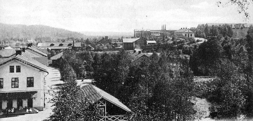 Bångbro